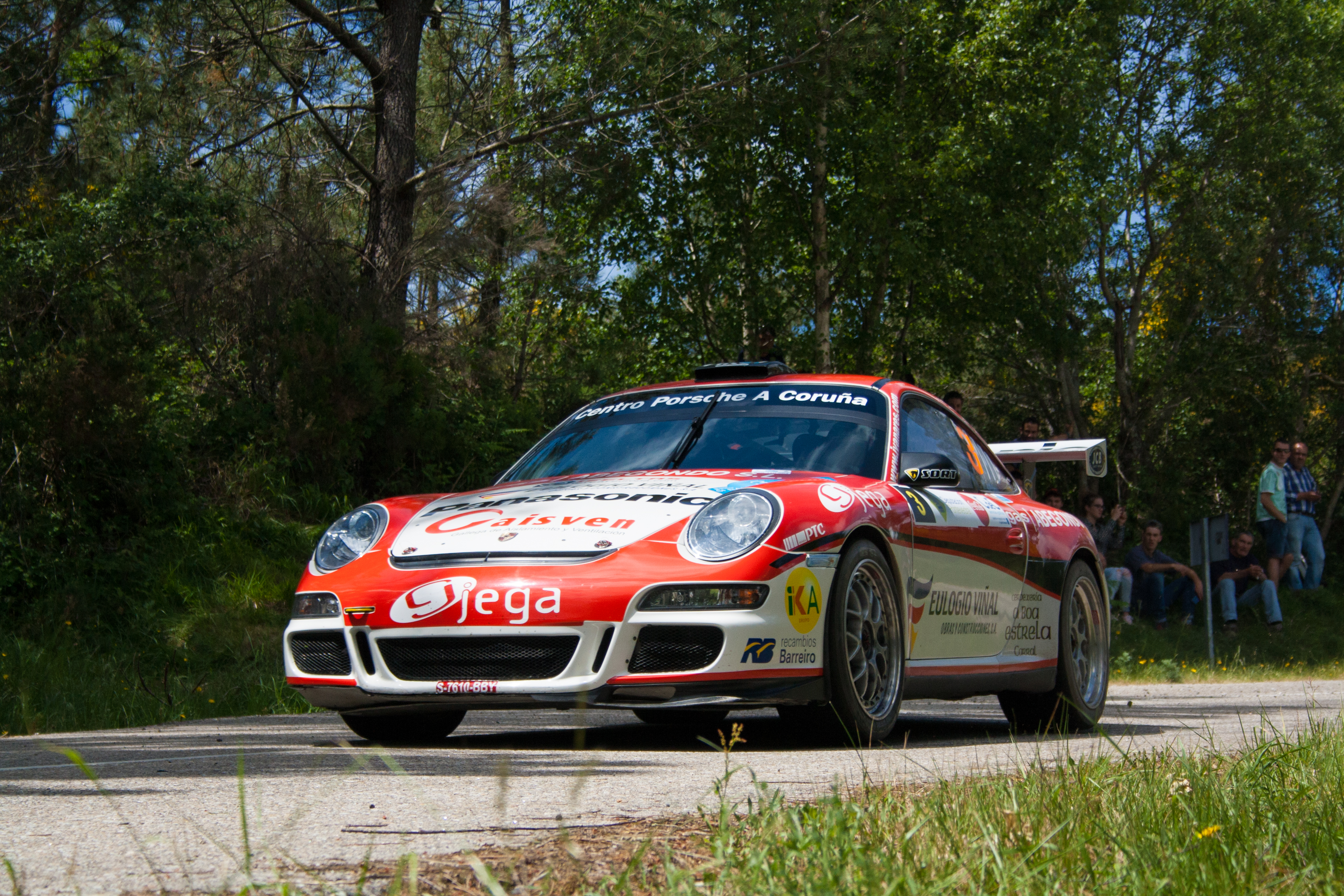 IVAN ARES ALVARO BAÑOBRE